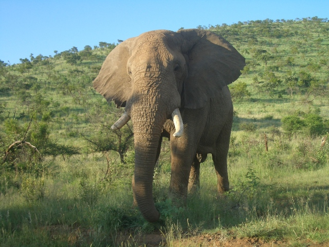 Elefant im Pilanesberg National Park